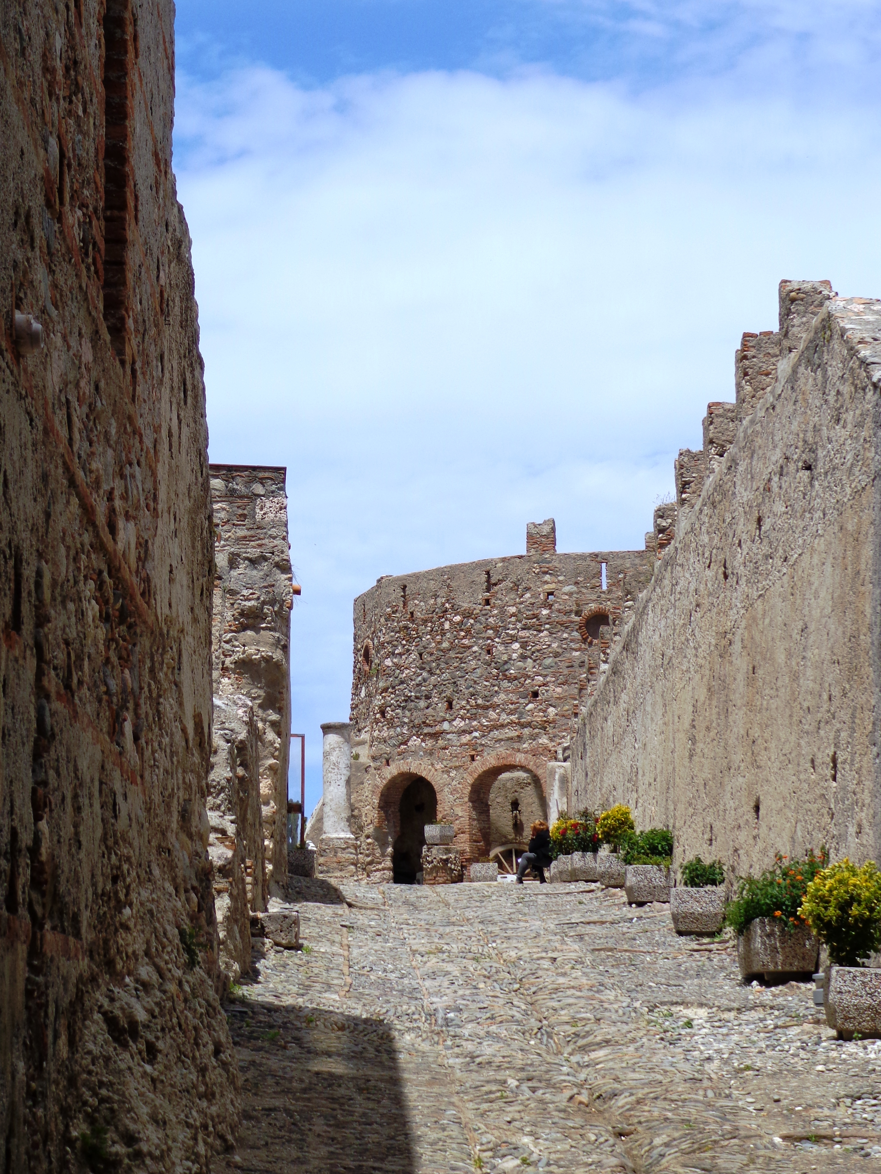 Castello di Bauso This is a photo of a monument which is part of cultural heritage of Italy.